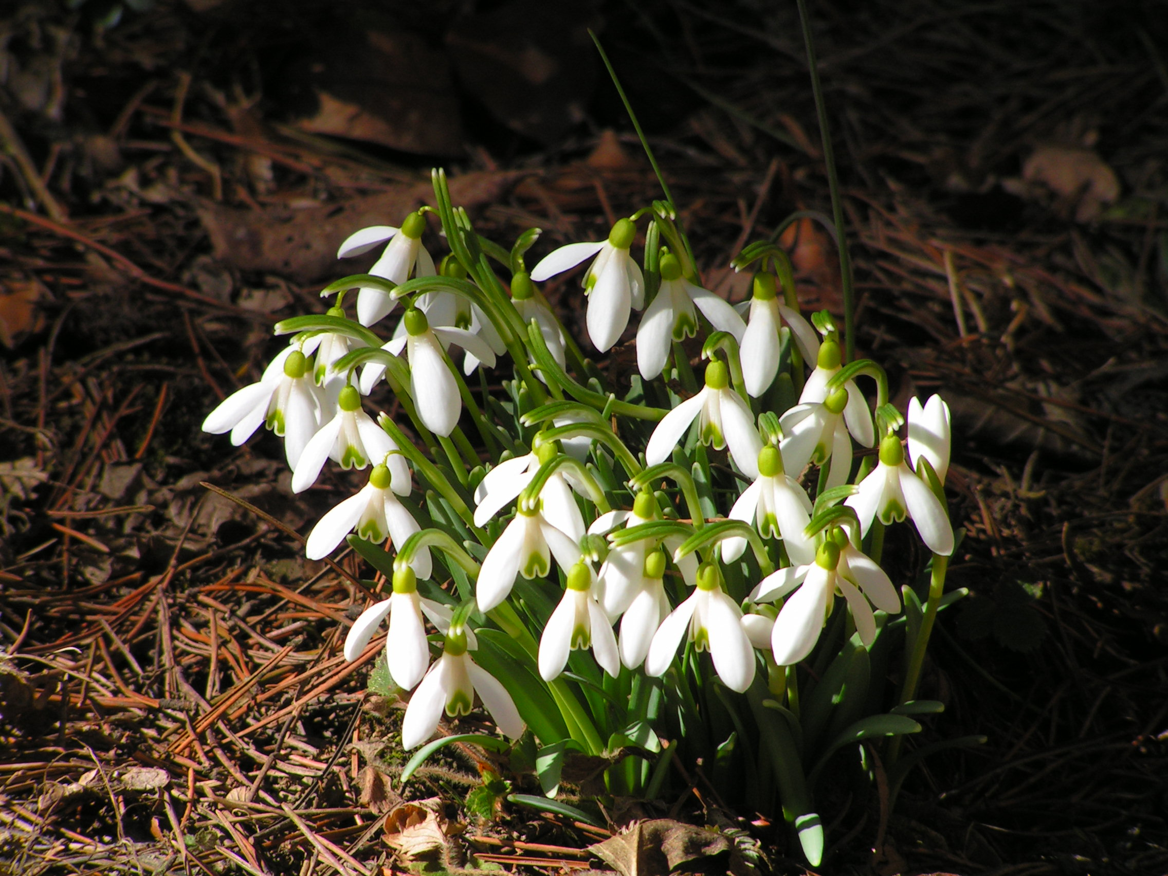 Frühlingsblumen Schneeglöckchen Galanthus nivalis Amaryllidaceae